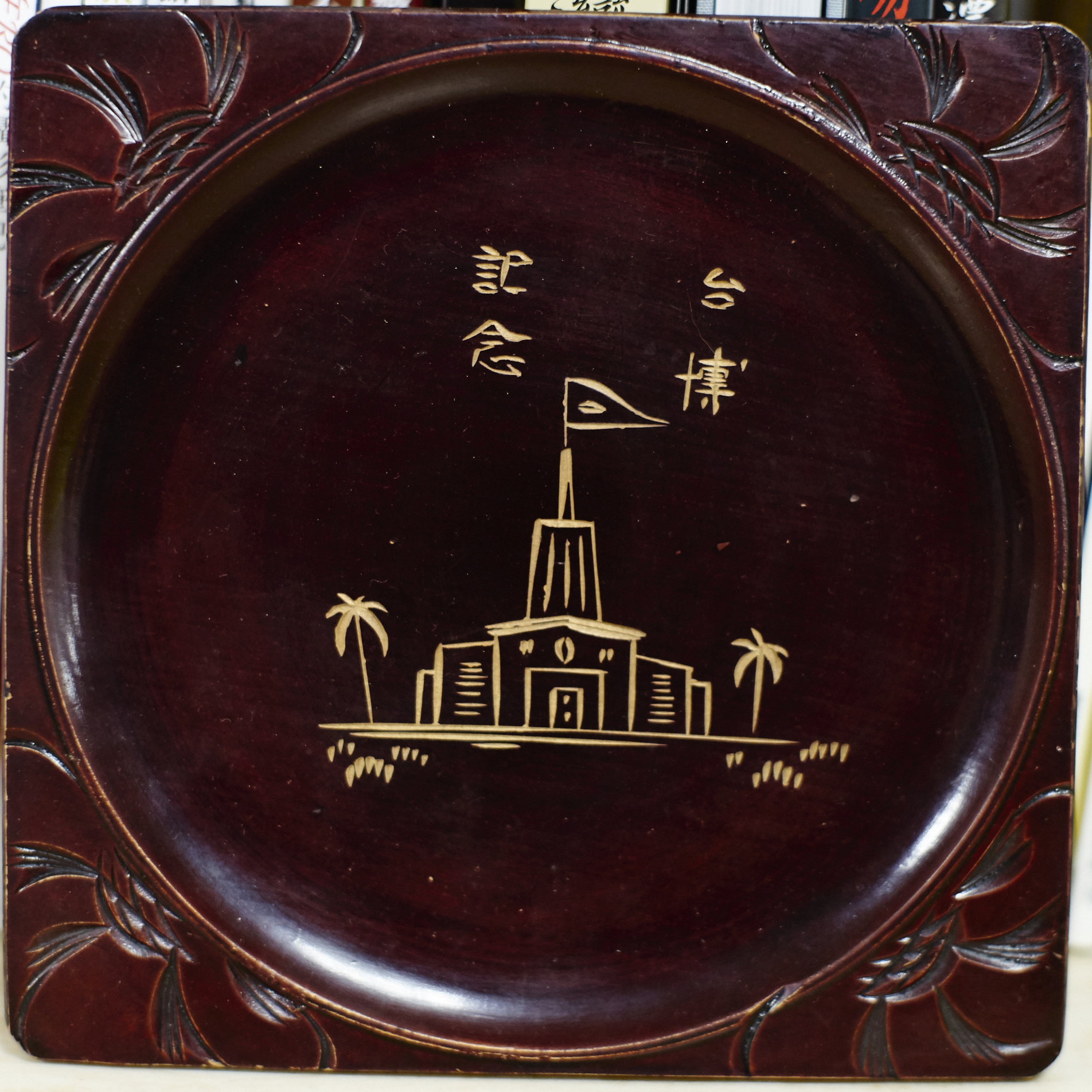 始政四十周年記念紀念盤